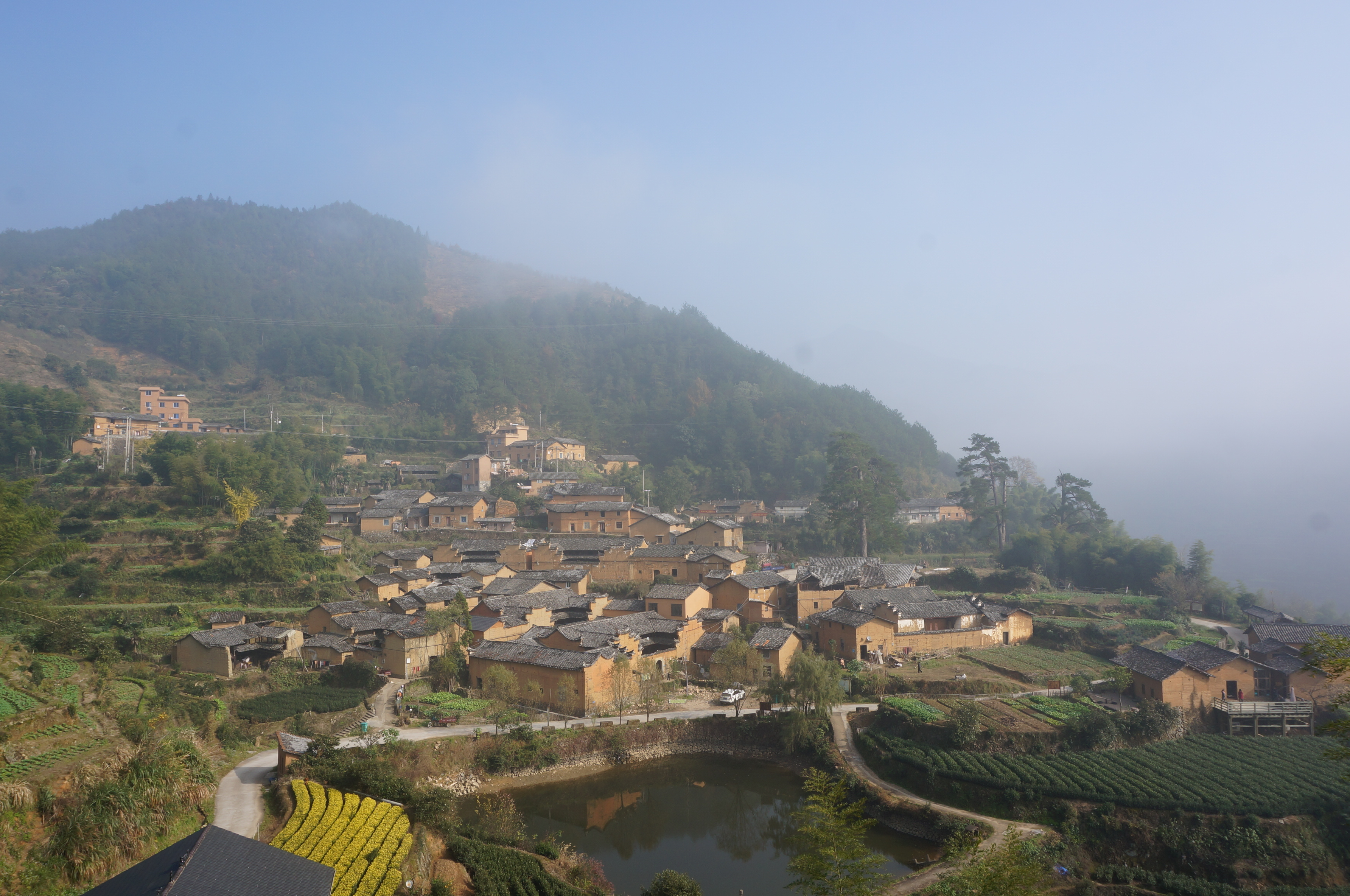 酉田村南面全景。